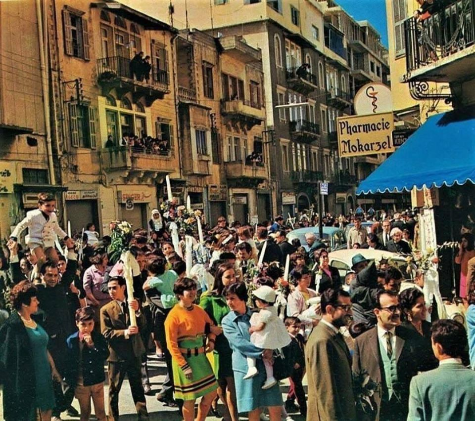 تبين الصورة مار مخايل ١٩٦٦